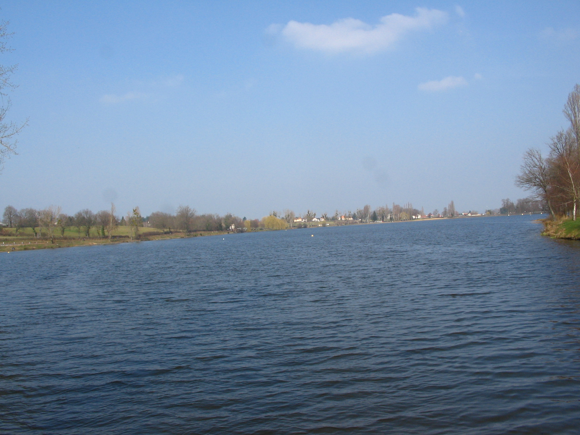 Étang de Sault à Prémilhat (03).